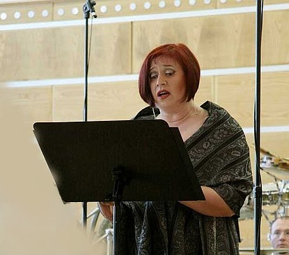 Kurtág Truszova koncert Pécs